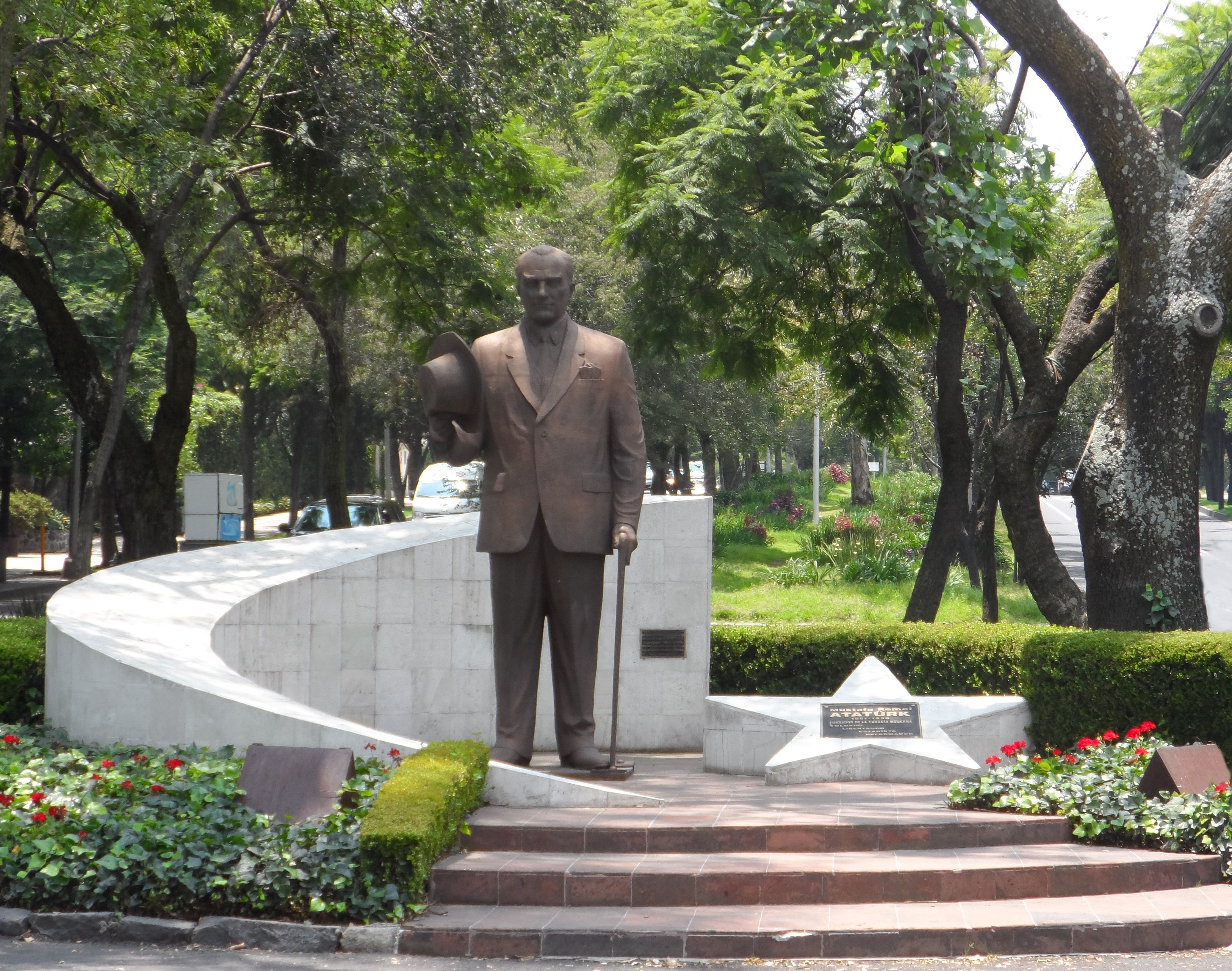 Recorte de la fotografía tomada al monumento a Mustafa Kemal Ataturk en agosto del 2014, ubicado sobre el Paseo de la Reforma en el Distrito Federal, México.